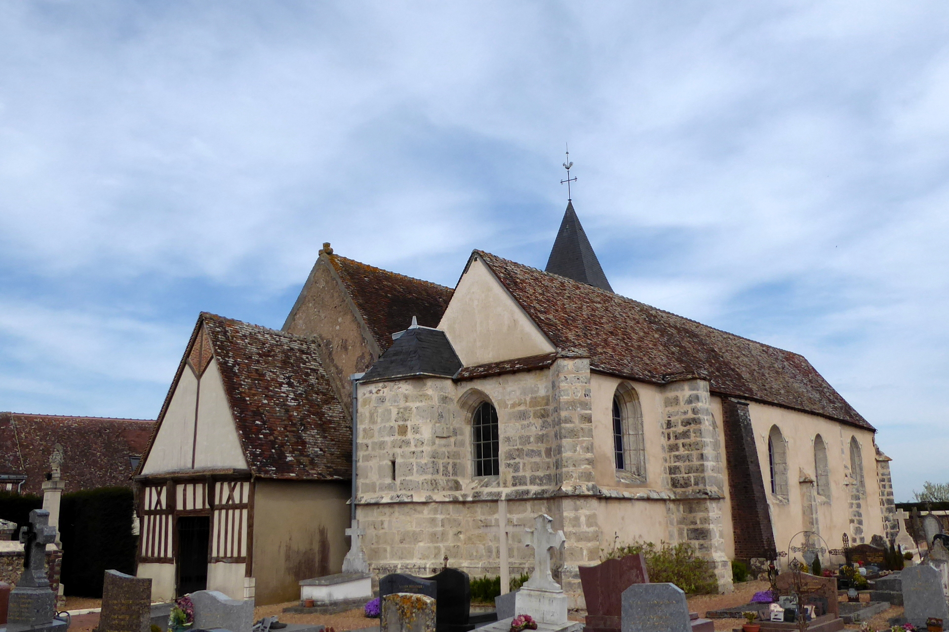 église Saint-Pierre, Chauffours, Eure-et-Loir (France).